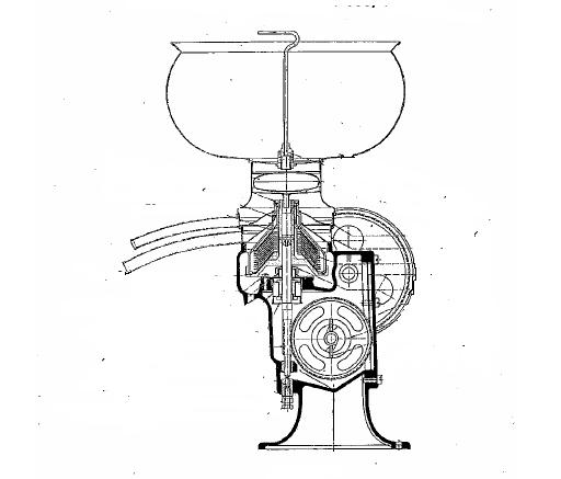 Westfalia separator, snitt-teikning Kjelde: Westfalia Gebrauchs-Anweisung (ca. 1930-35) Westfalia har gitt løyve til bruk av teikningane: sie können die drei Bilder von Westfalia Separator in dem Arktikel verwenden. / Mit freundlichen Grüßen / i. A.Christiane Lohmüller / Westfalia Separator AG / Corporate Communications